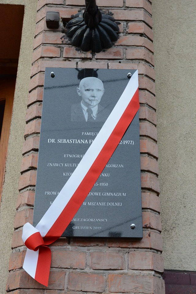 Tablica poświęcona Sebastianowi Flizakowi, odsłonięta 16 grudnia 2019 r. na budynku Zespołu Szkół Techniczno-Informatycznych przy ul. Matejki 11 w Mszanie Dolnej. Fot. Jan Ceklarz